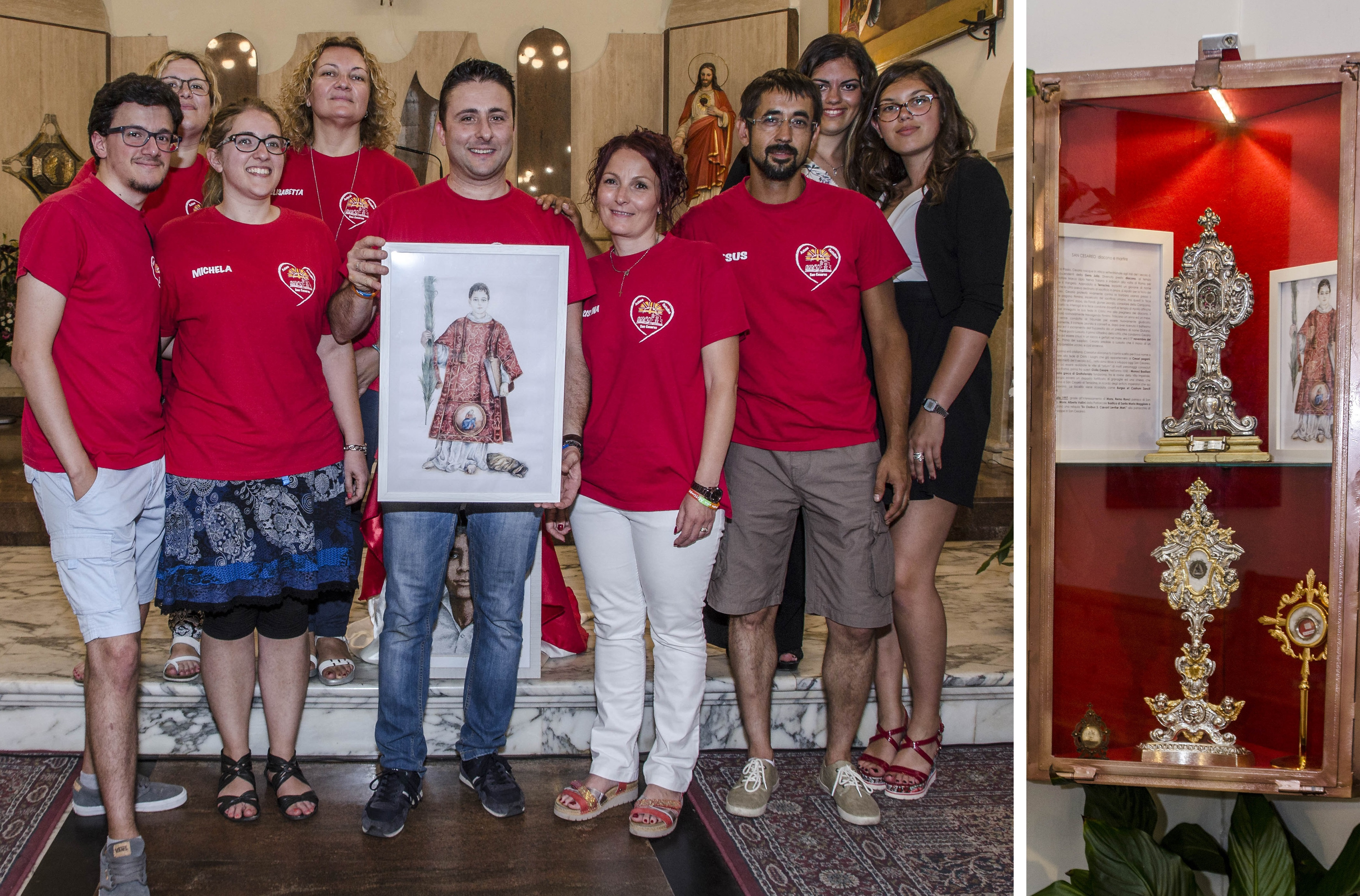 San Cesareo (Rm), Chiesa di San Giuseppe: vetrina contenente il reliquiario argenteo di San Cesareo diacono e martire. Nella foto sono presenti alcuni membri dell'Azione Cattolica di San Cesareo ed il Presidente, Andrea Torre, con la nuova icona del santo.